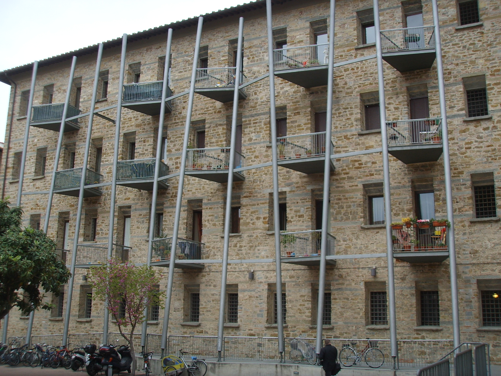 Complesso delle murate. Prime Case popolari assegnate nel 2004